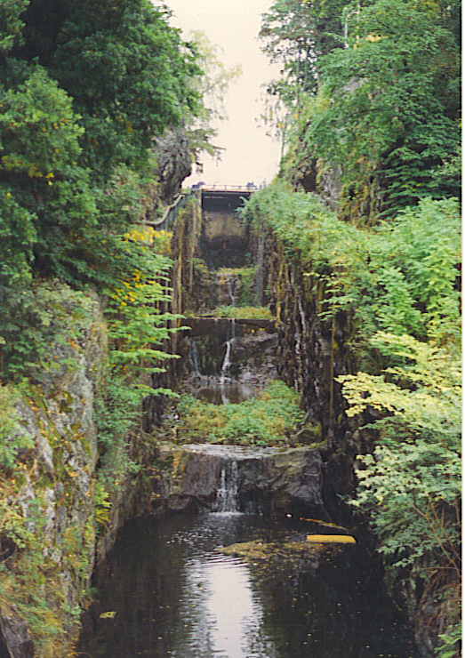 Propre Photo